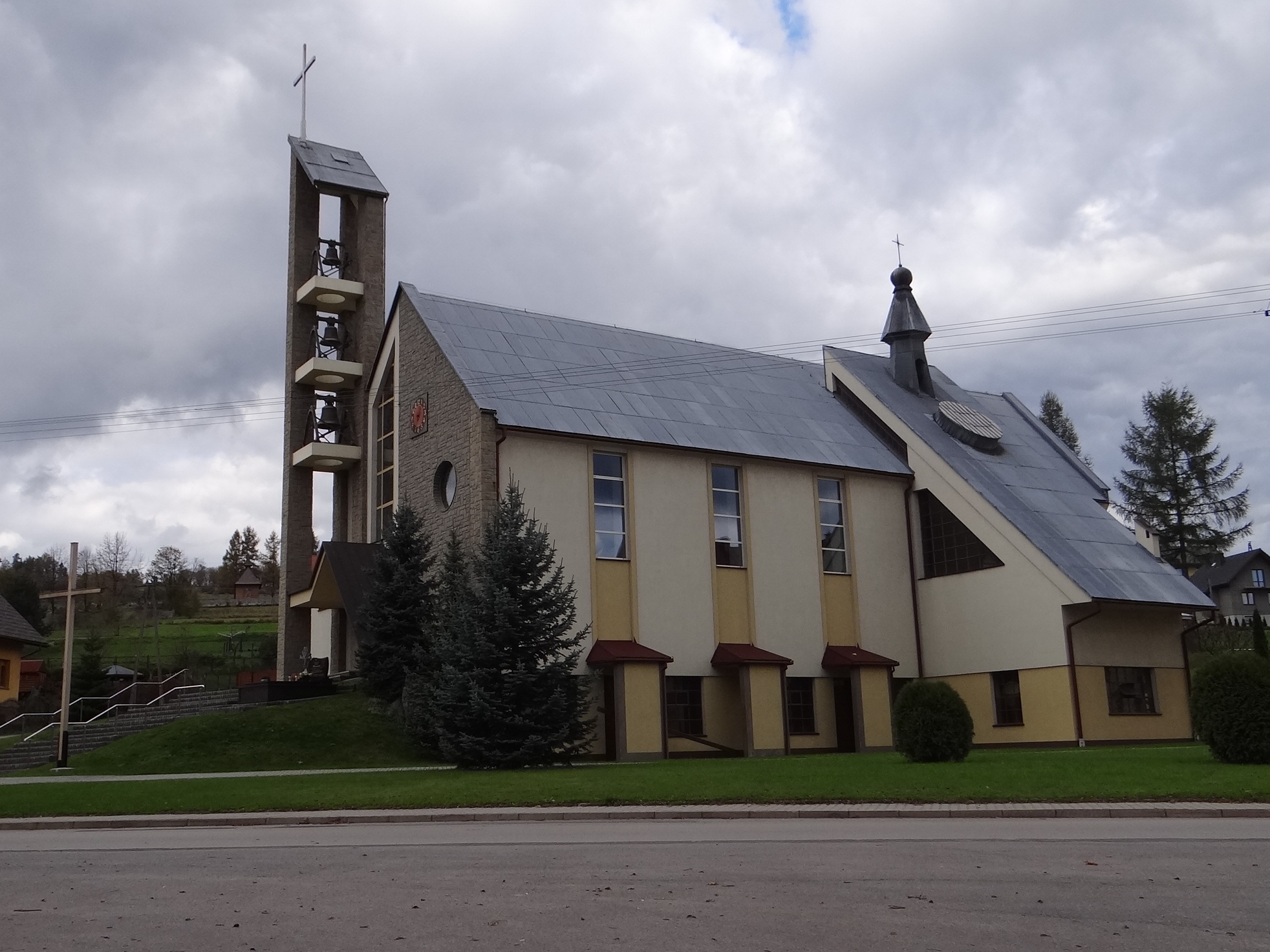 Kościół w Toporzysku